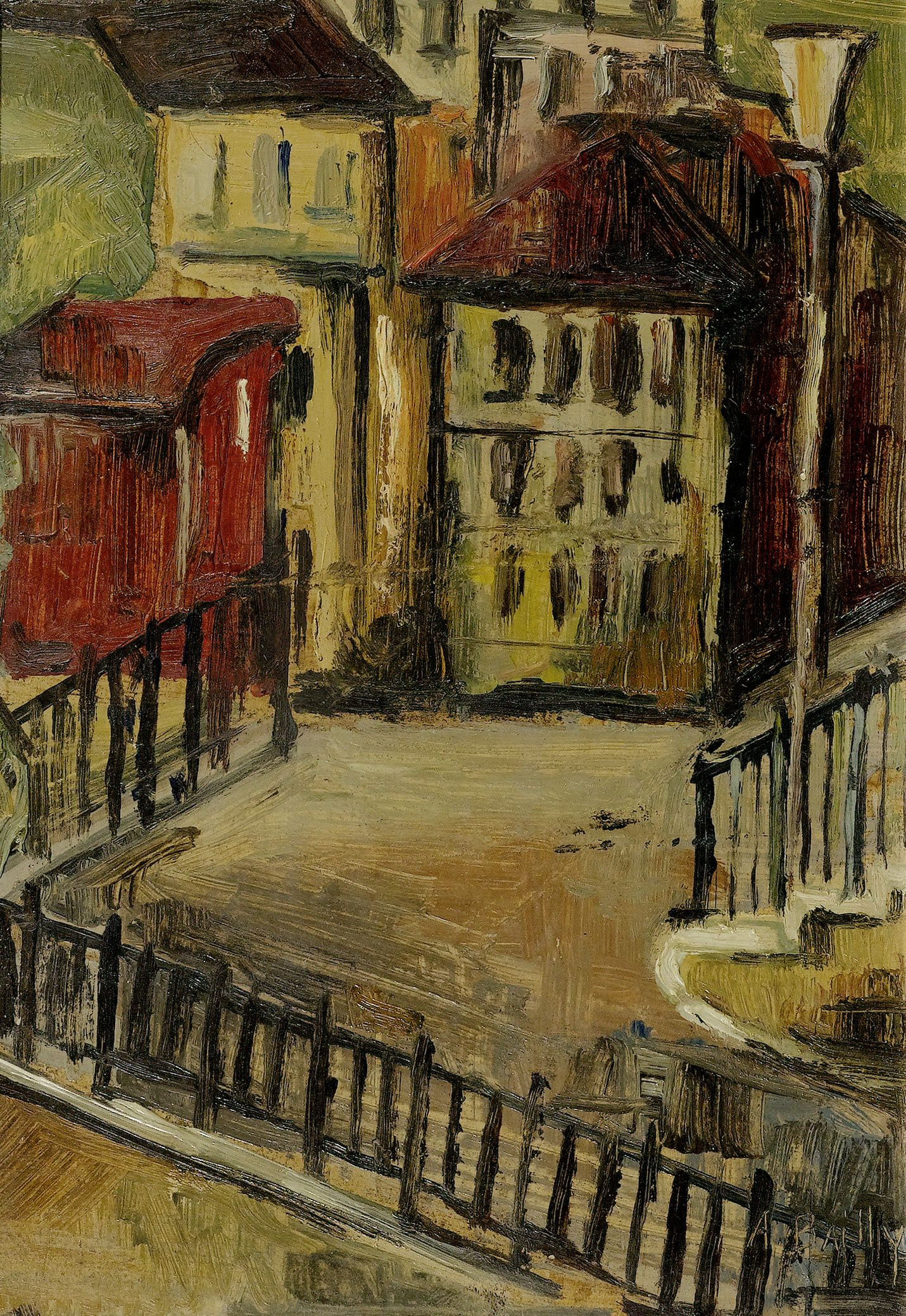 Blick auf einen Hinterhof. Öl auf Hartfaserplatte, 27,7 x 19,2 cm